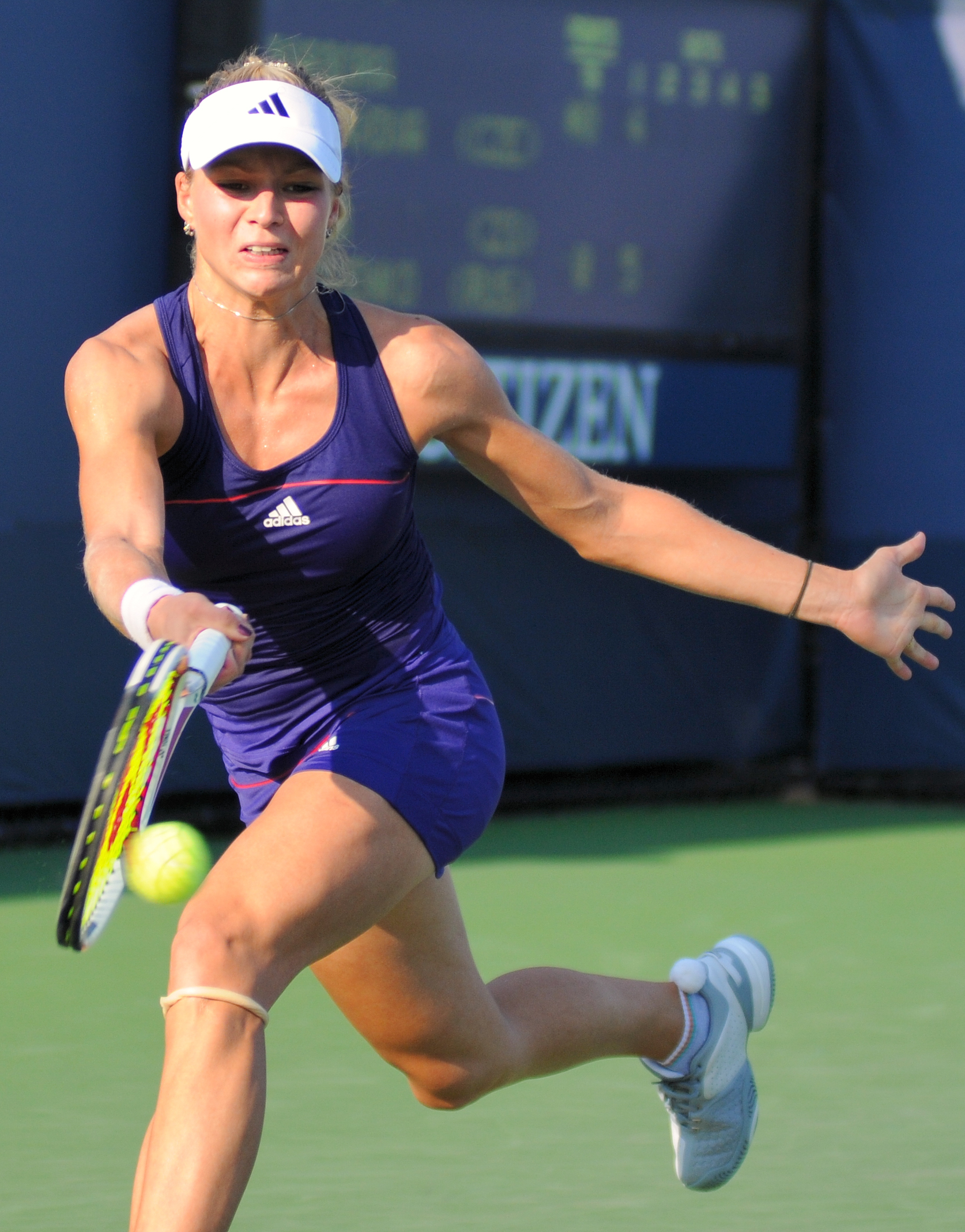 Maria Kirilenko - US Open 2010